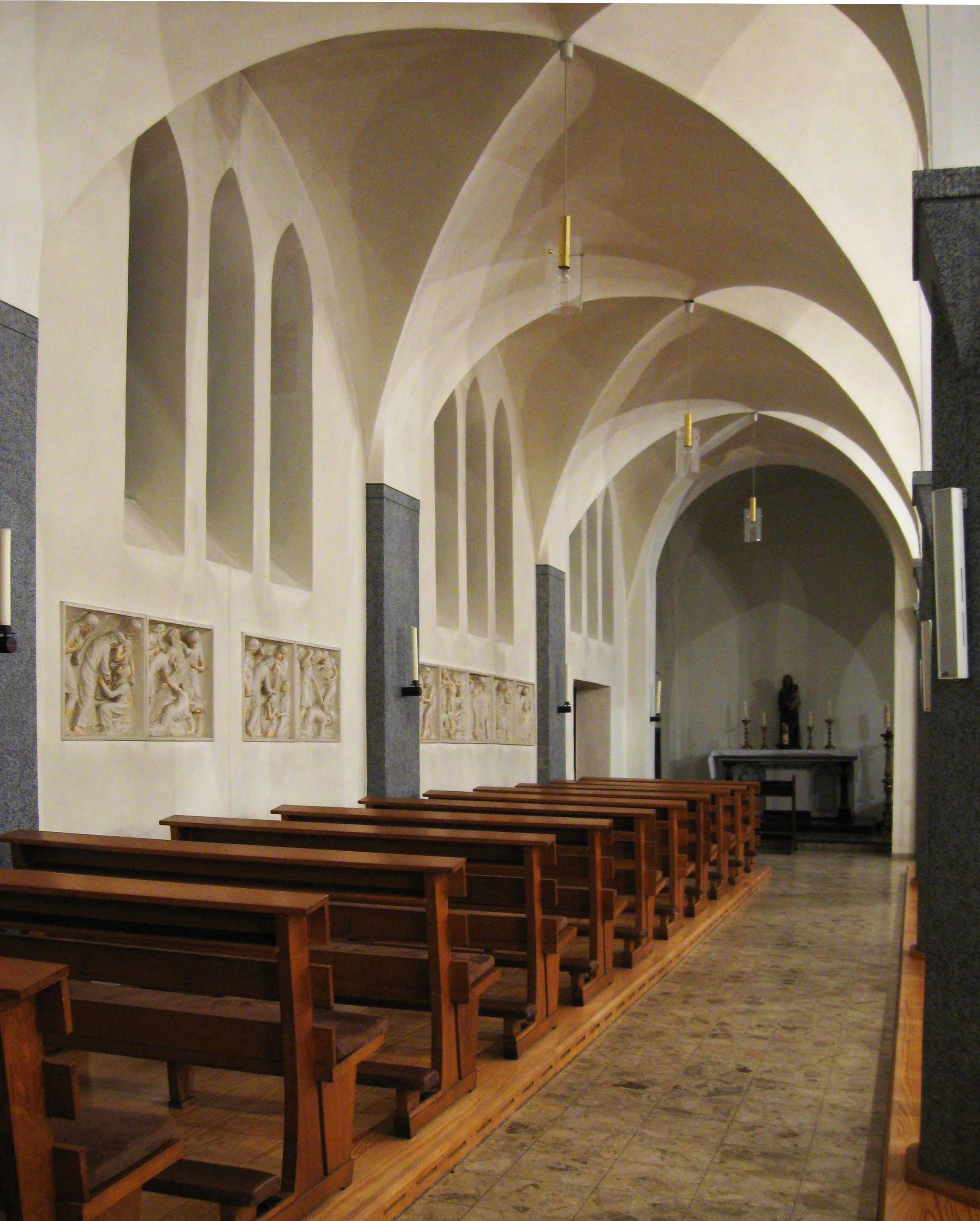 Taufbecken in der katholischen Kirche in Oidtweiler